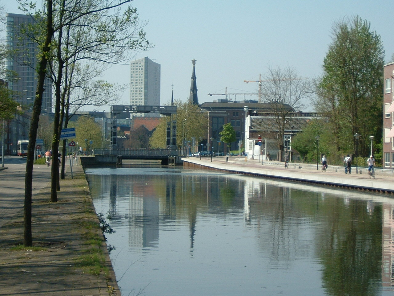 Eigen foto